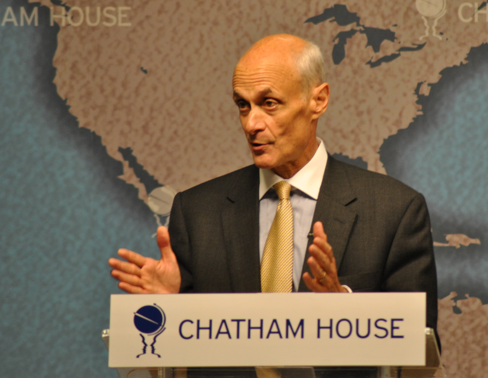 5 September 2011